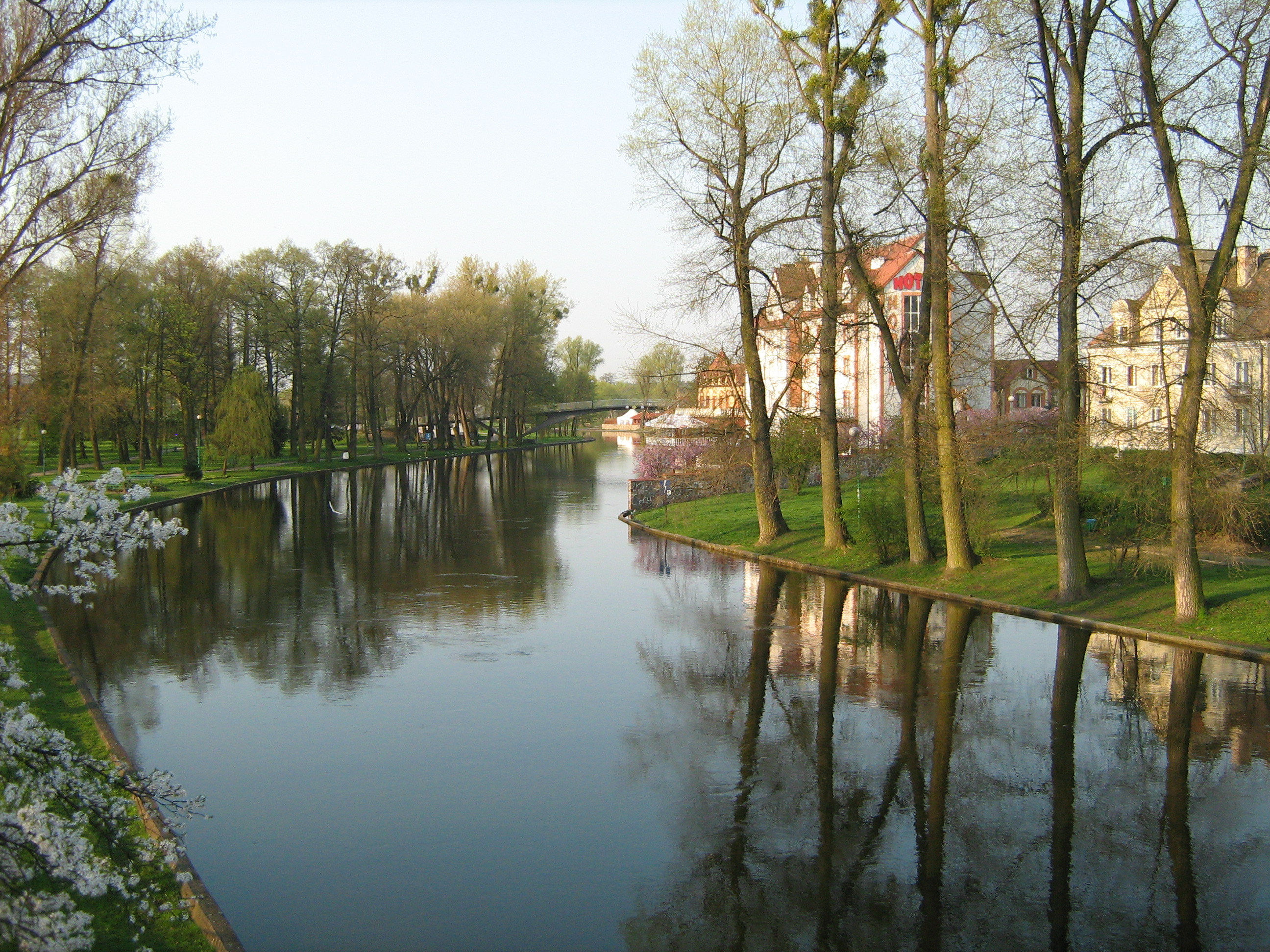 Widok na rzekę Pisę z mostu drogowego w Piszu.